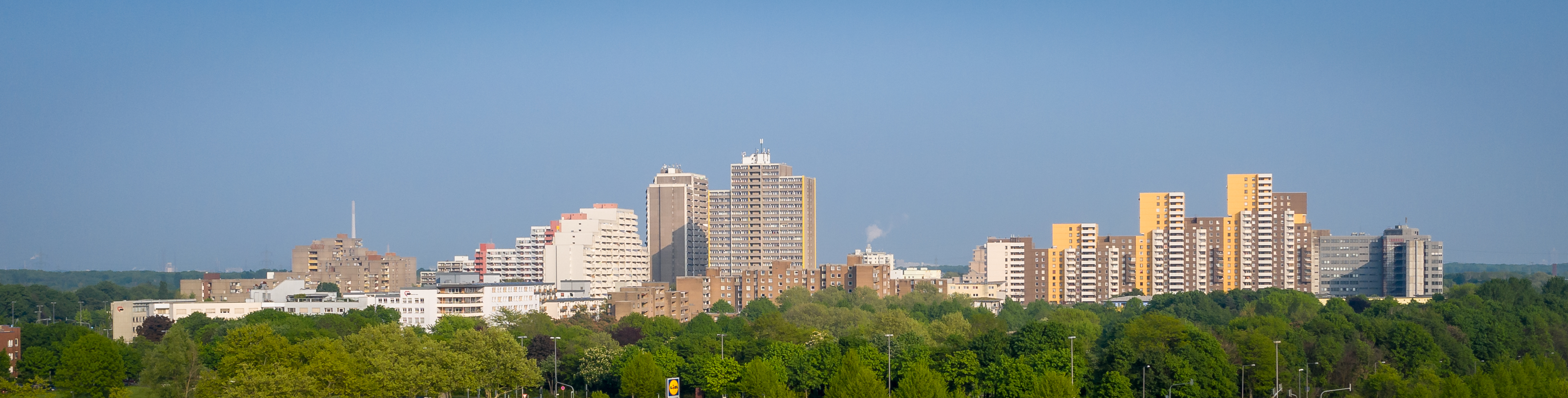 Köln-Chorweiler aus der Luft